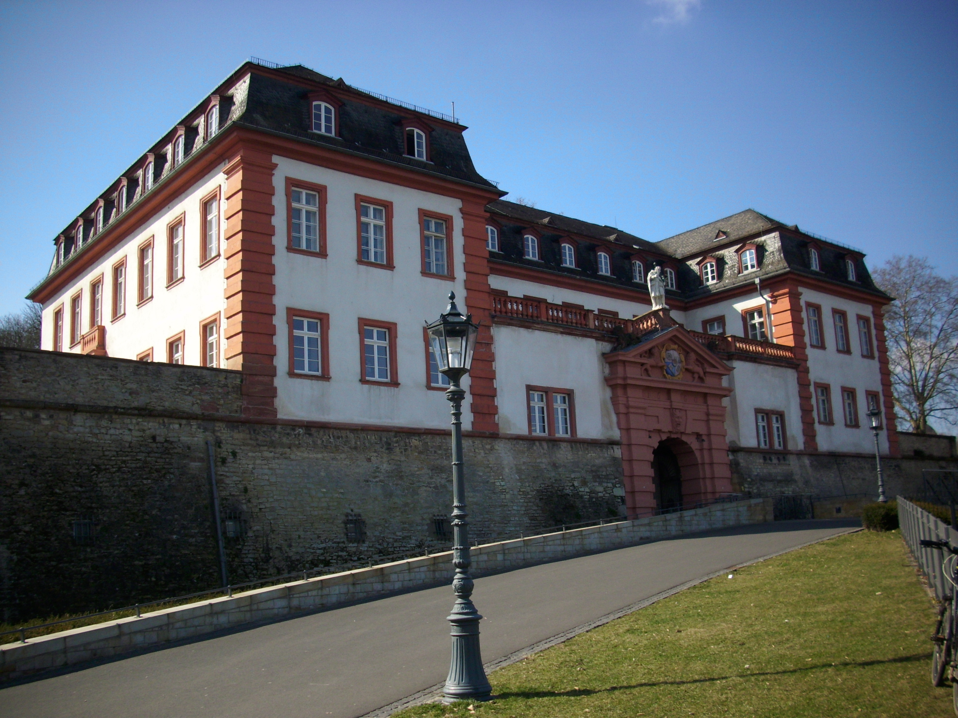 Rheinseitige Toranlage der Haupttraverse, bezeichnet 1660, Architekt Antonio Petrini; dreiflügeliger Kommandantenbau, 1696 begonnen, 1833 erhöht, nach Kriegszerstörung 1950 in ursprünglicher Form als zweigeschossiger Mansarddachbau wiederhergestellt